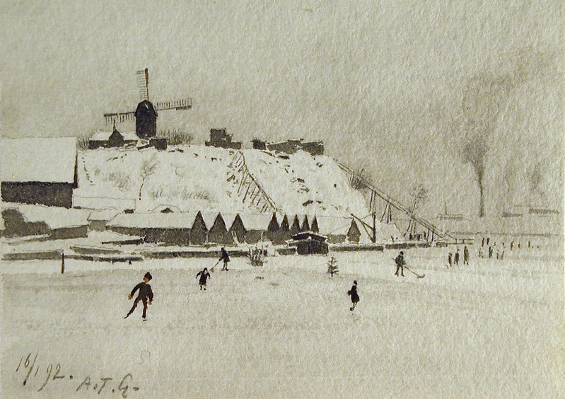 Grubbens kvarn 16 jan 1892